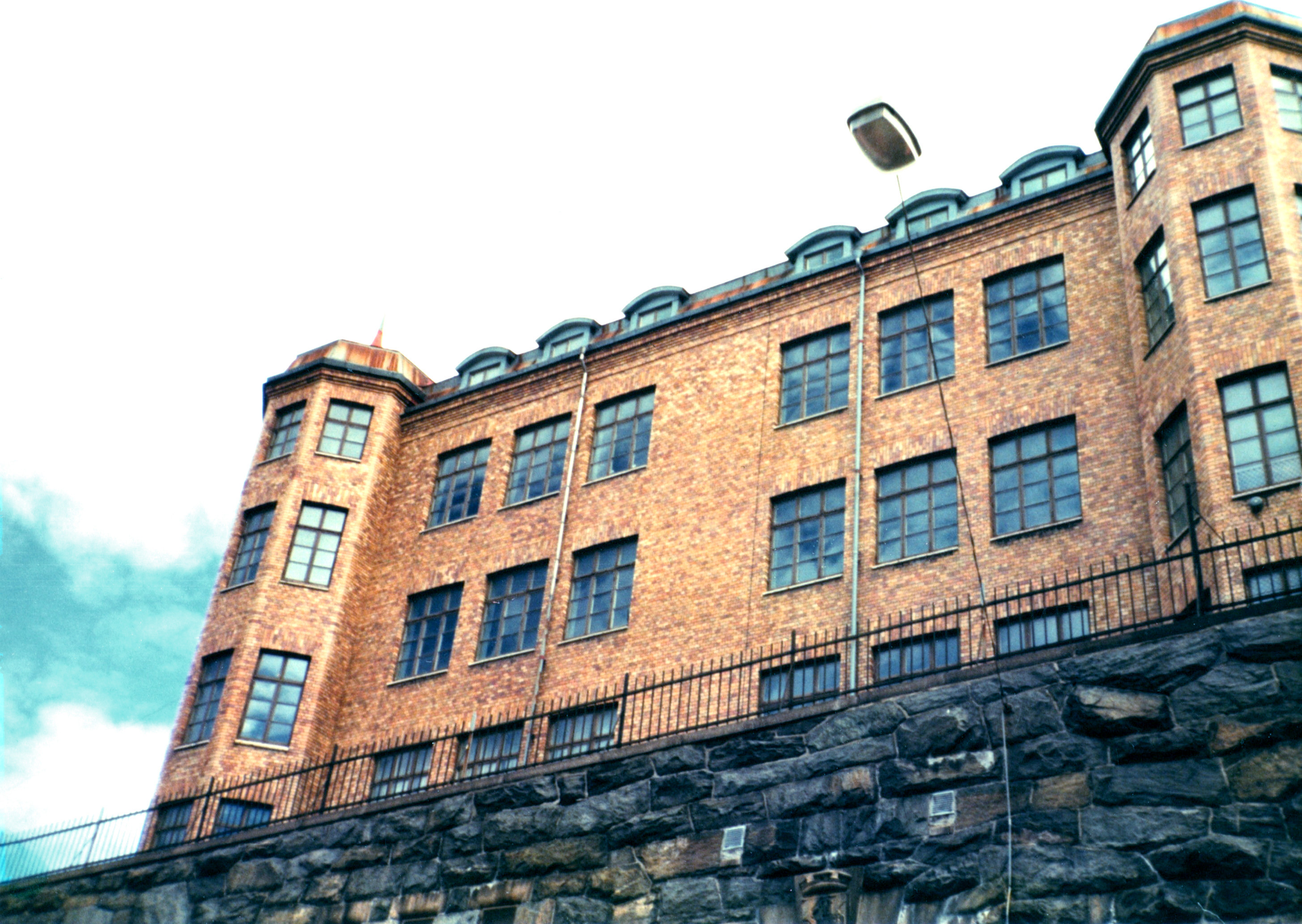 Otterhälleskolan (Viktor Wångfeldts gymnasium, 1976)